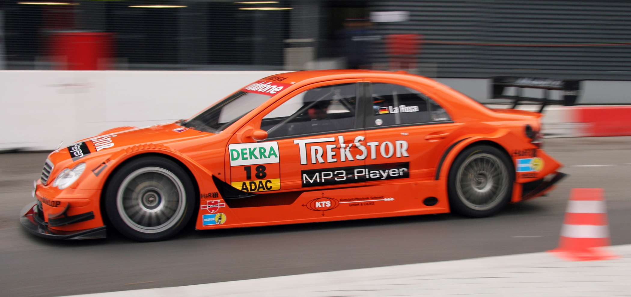 DTM car Mercedes-Benz AMG 2005 (C-Class, W203), La Rosa (driver)